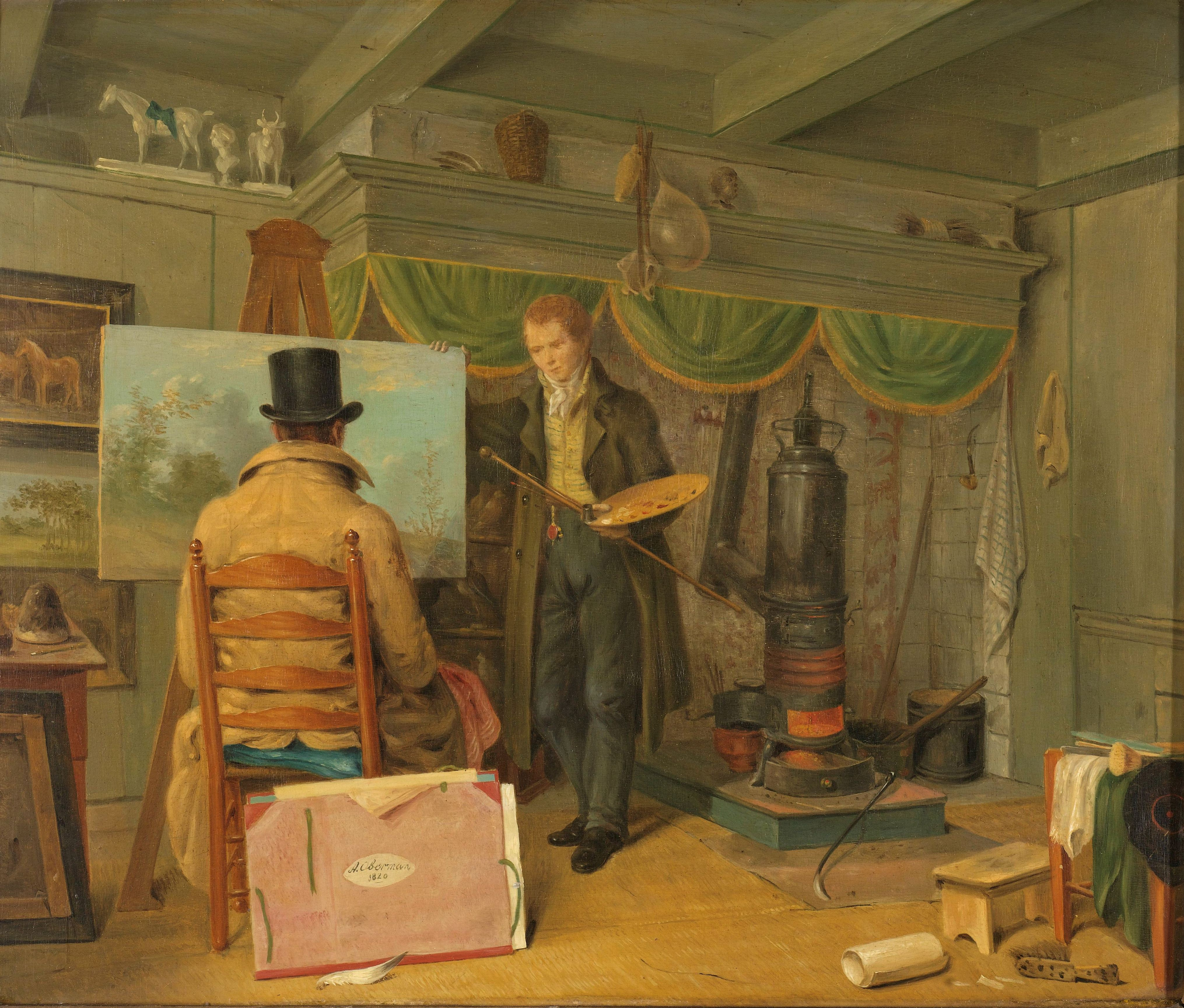 De schilder in zijn atelier. Interieur van het atelier met rechts een schouw en kachel en links een schildersezel waarop een landschap. Voor de ezel een man met hoge hoed op een stoel; rechts van de ezel staat de schilder met in zijn linkerhand een palet, penselen en een schildersstok. Aan de muur hangen meer schilderijen, een portefeuille met tekeningen staat tegen de stoel geleund.